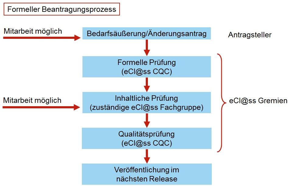 eCl@ss-Release-Entwicklung